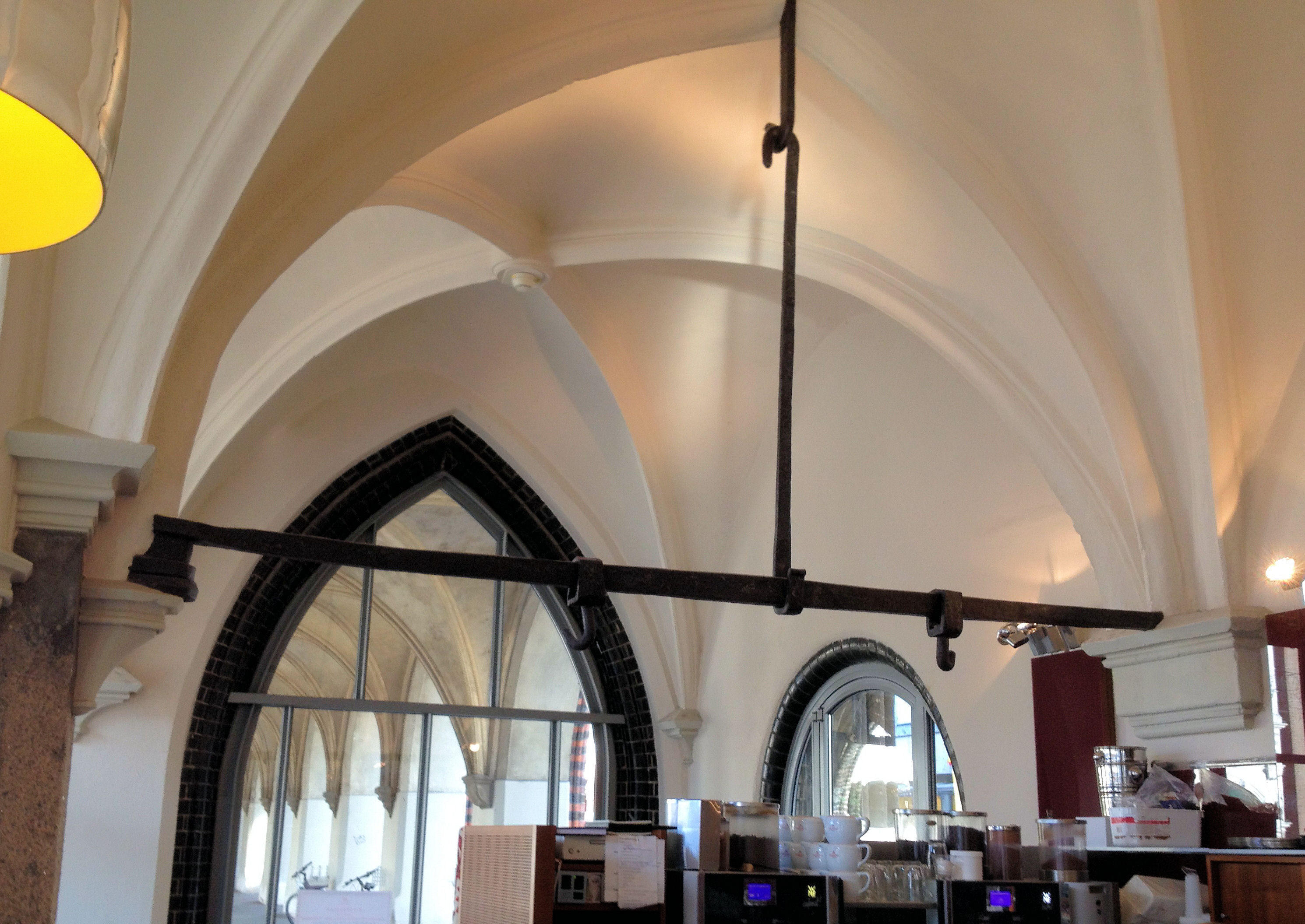 Die Überreste der Oberwaage in Lübeck